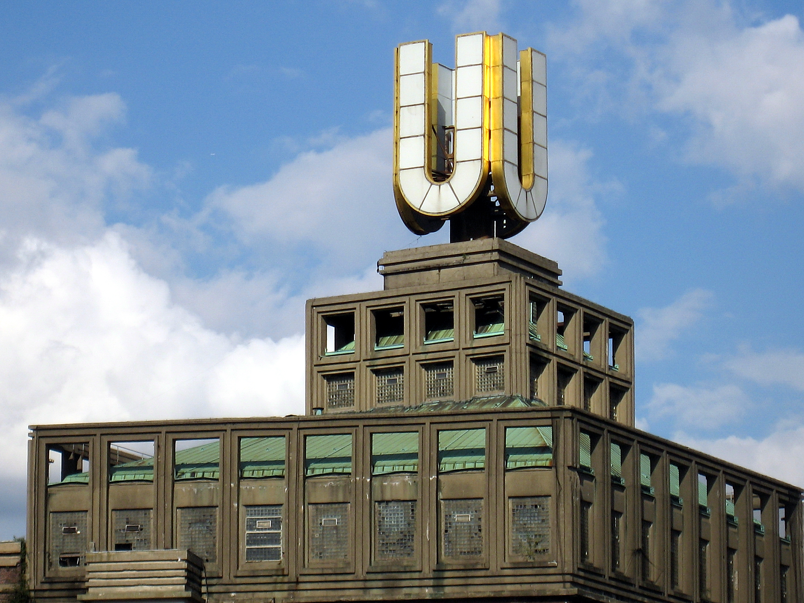 Dortmund, „das U“: frühere Union-Brauerei, Brau- und Brunnen, Westfassade